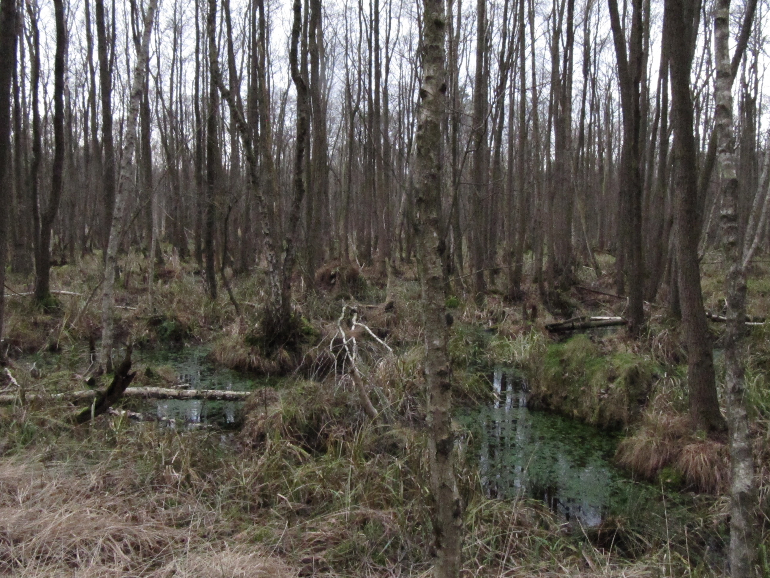 Erlenbruchwald in der Pritzerber Laake (NSG)